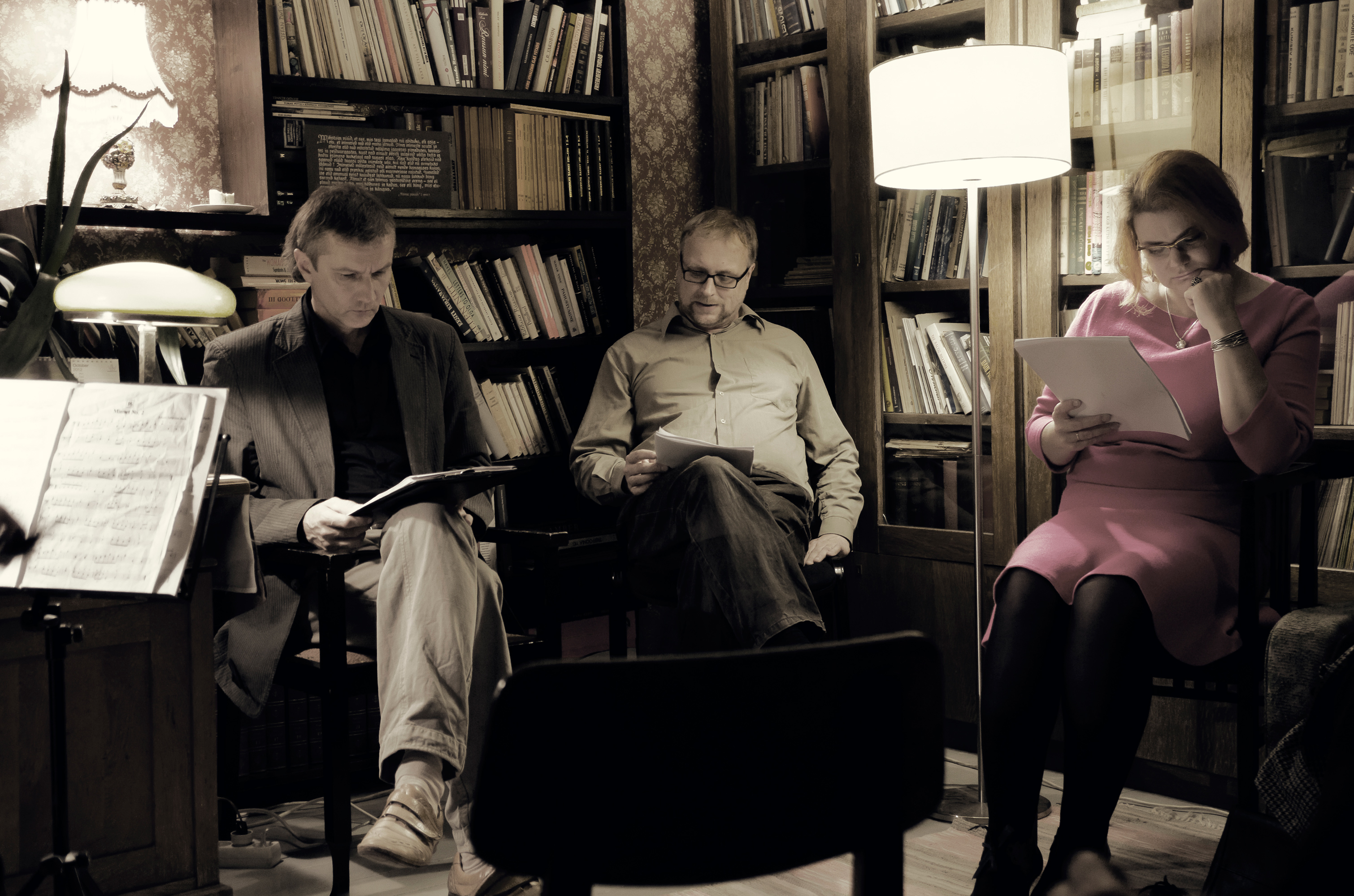 Loone Otsa näidendi "Üksainus araabia öö. Salme Niilendi näidend" ettelugemine Karl Ristikivi Seltsi korteris 15.10.2012